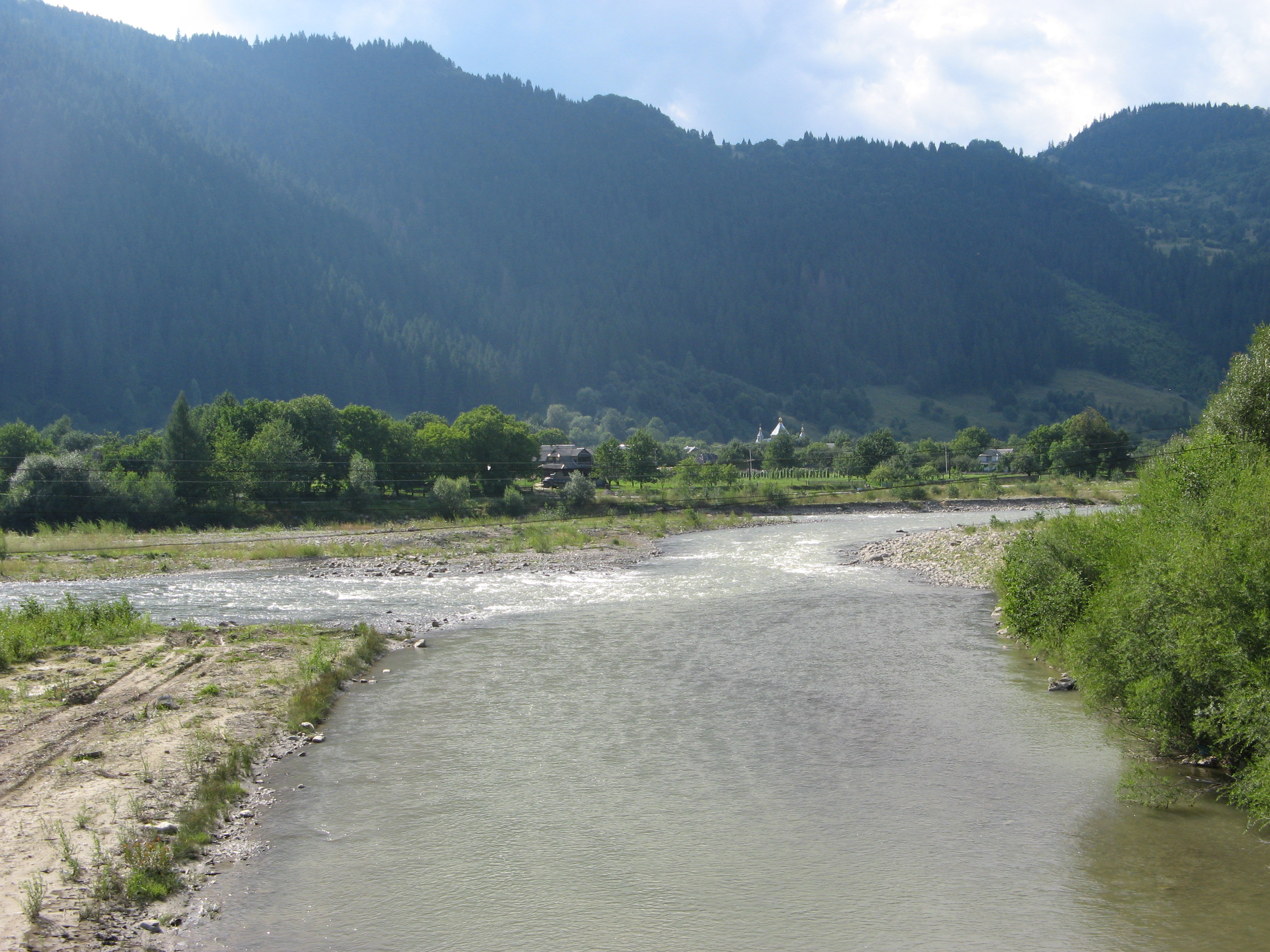 р. Черемош біля села Усть-Путила; місце впадіння р. Путилки до Черемошу